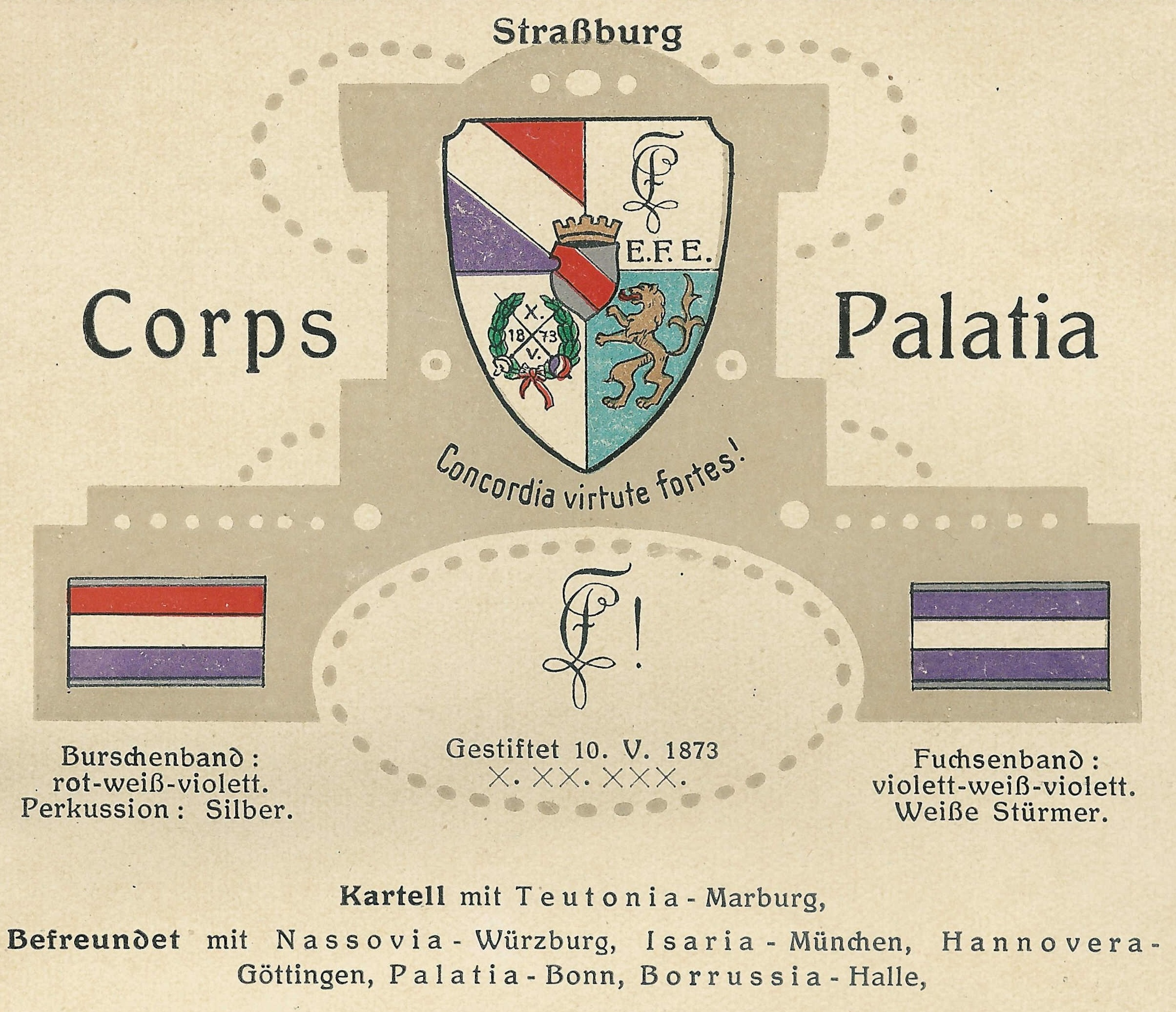 Wappen, Couleur und Zirkel des Corps Palatia Straßburg